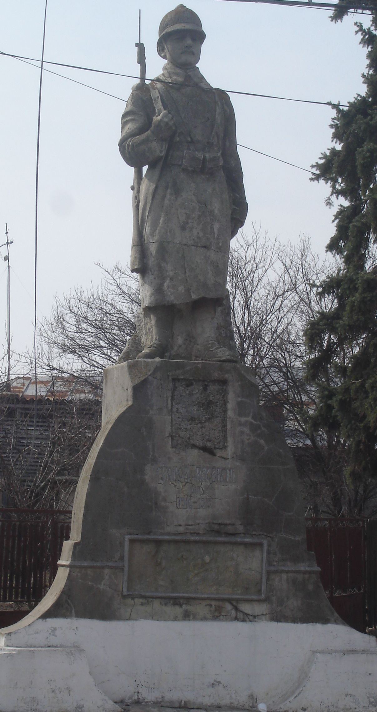 Răcari - monumentul eroilor